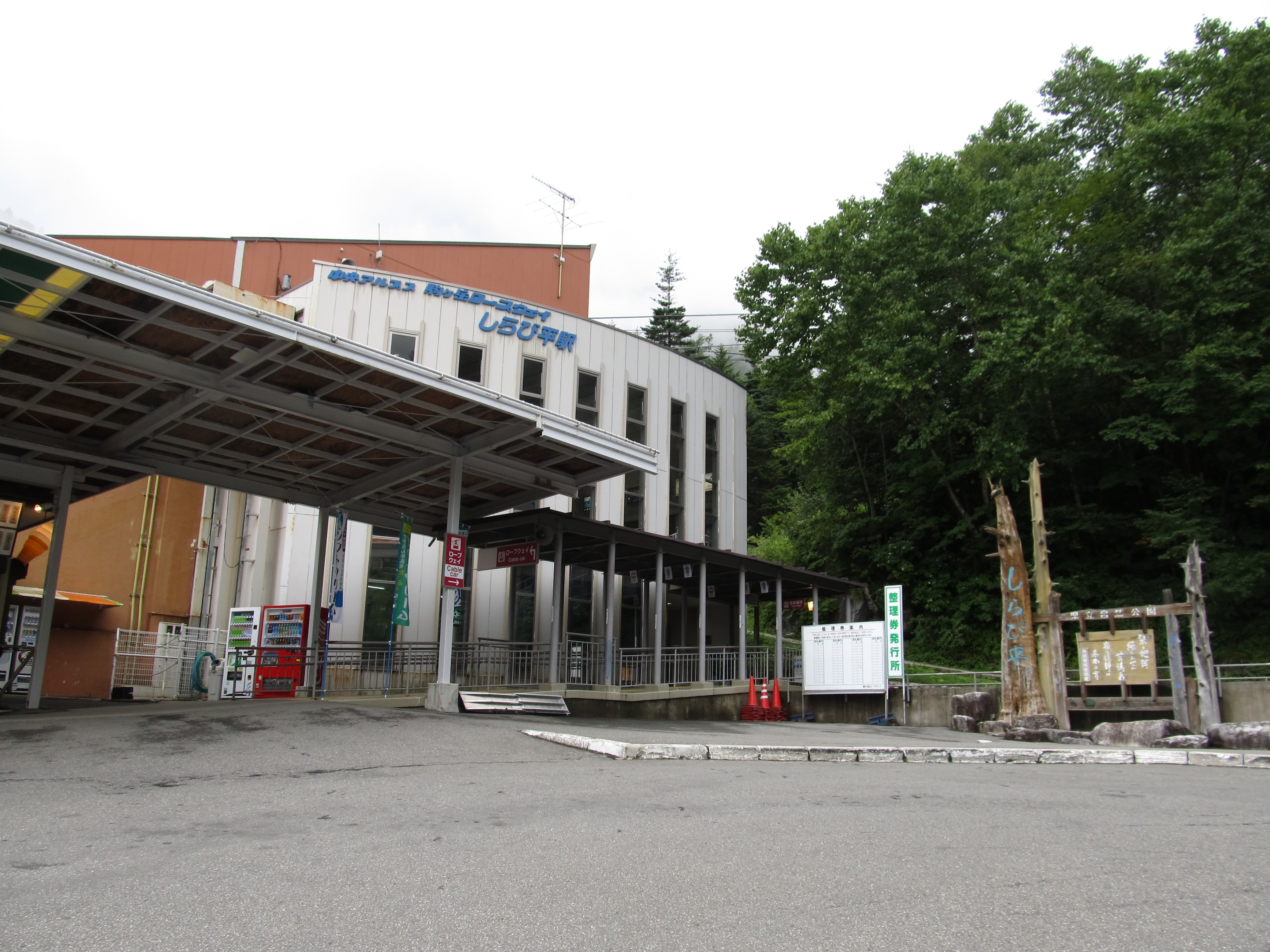 長野県上伊那郡宮田村にある駒ケ岳ロープウェイのしらび平駅。